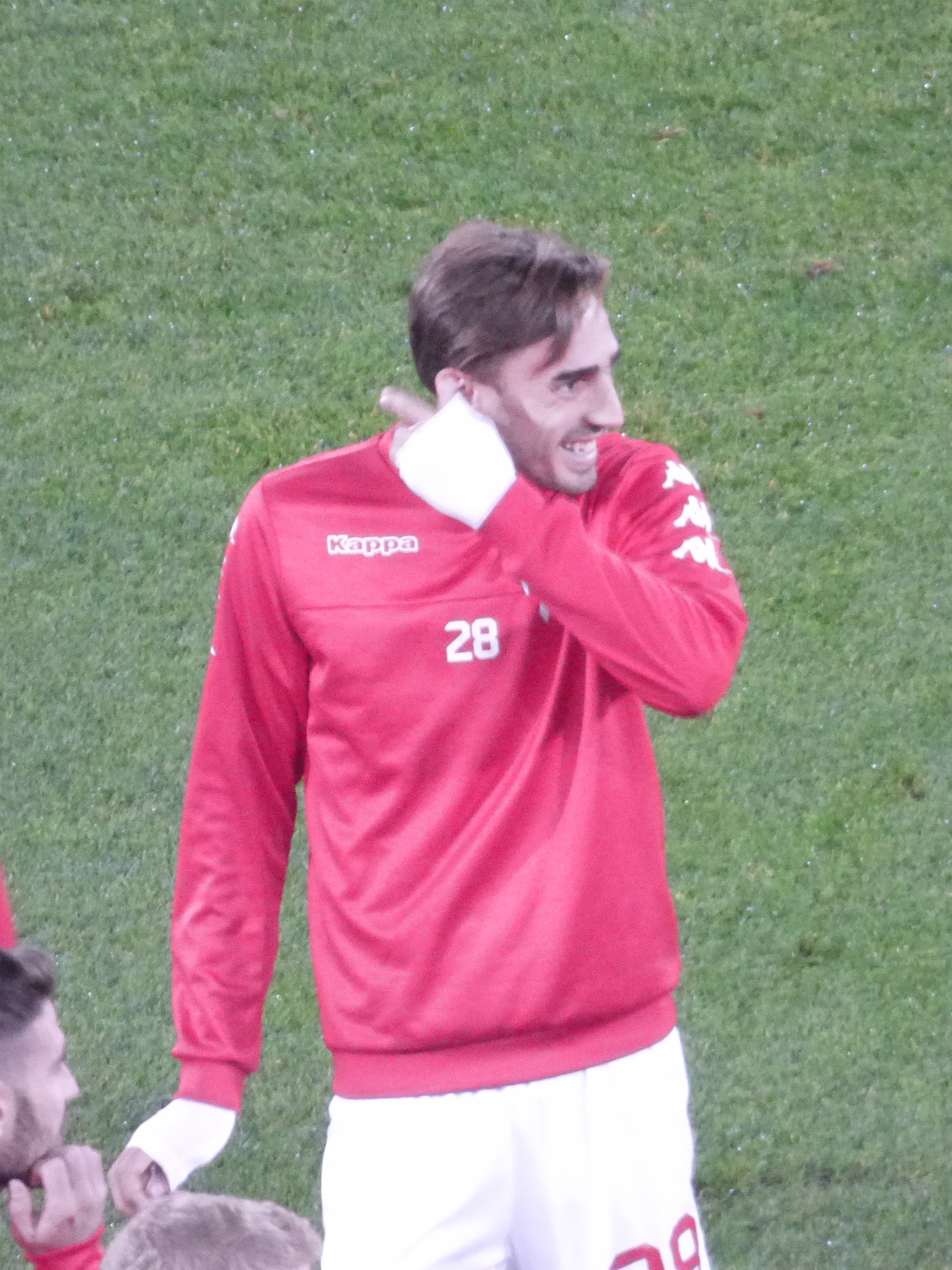 Alessandro Capello lors du match amical RC Lens - Calcio Padova, le 11 octobre 2018 au Stade Bollaert-Delelis de Lens.